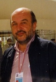 El político Joaquín Almunia